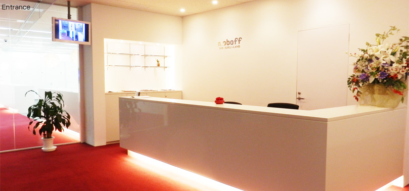 受付エントランス